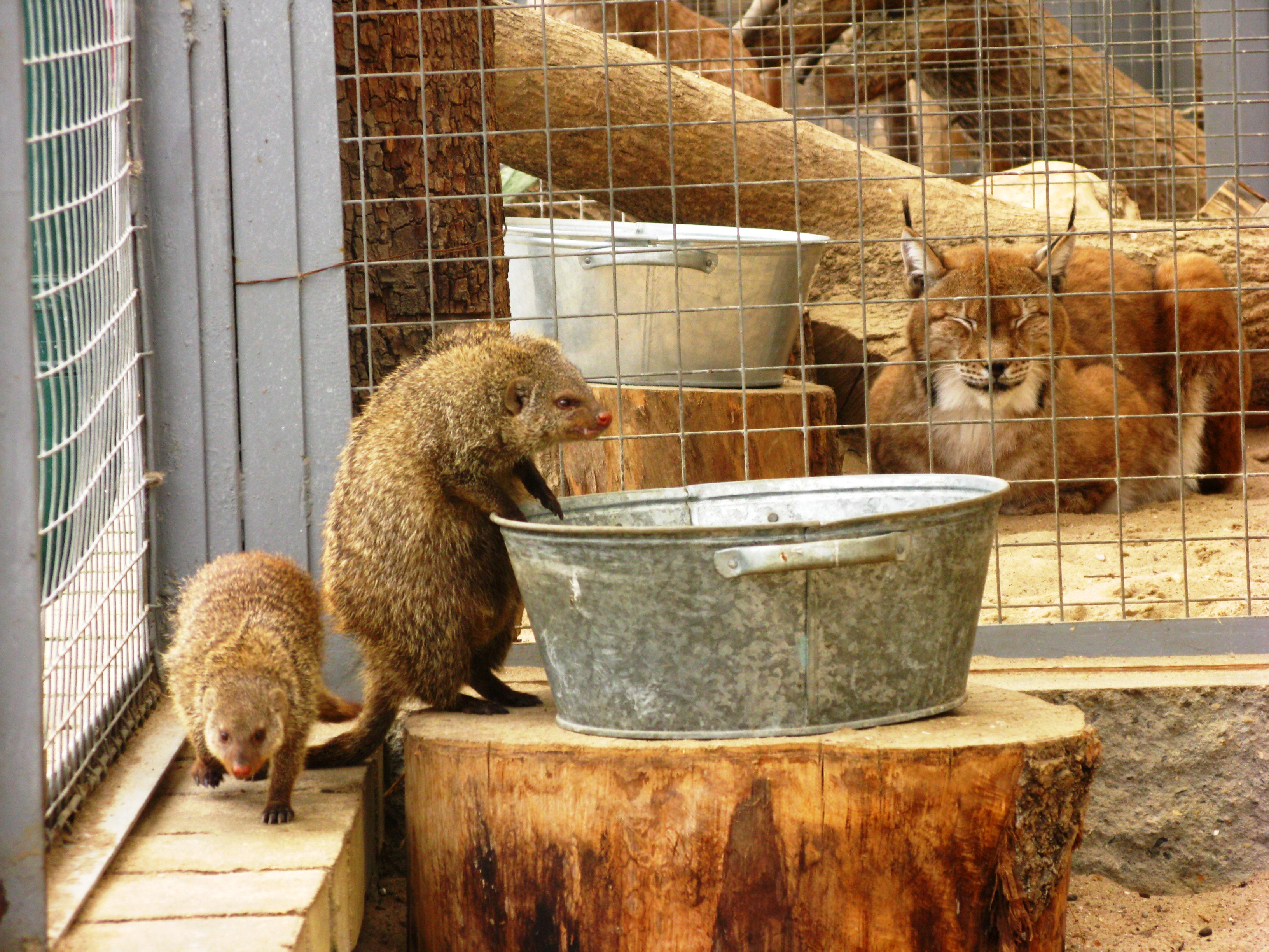 Полосатые мангусты (Mungos mungo) и рысь (Lynx lynx) в зоопарке города Гродно, Беларусь